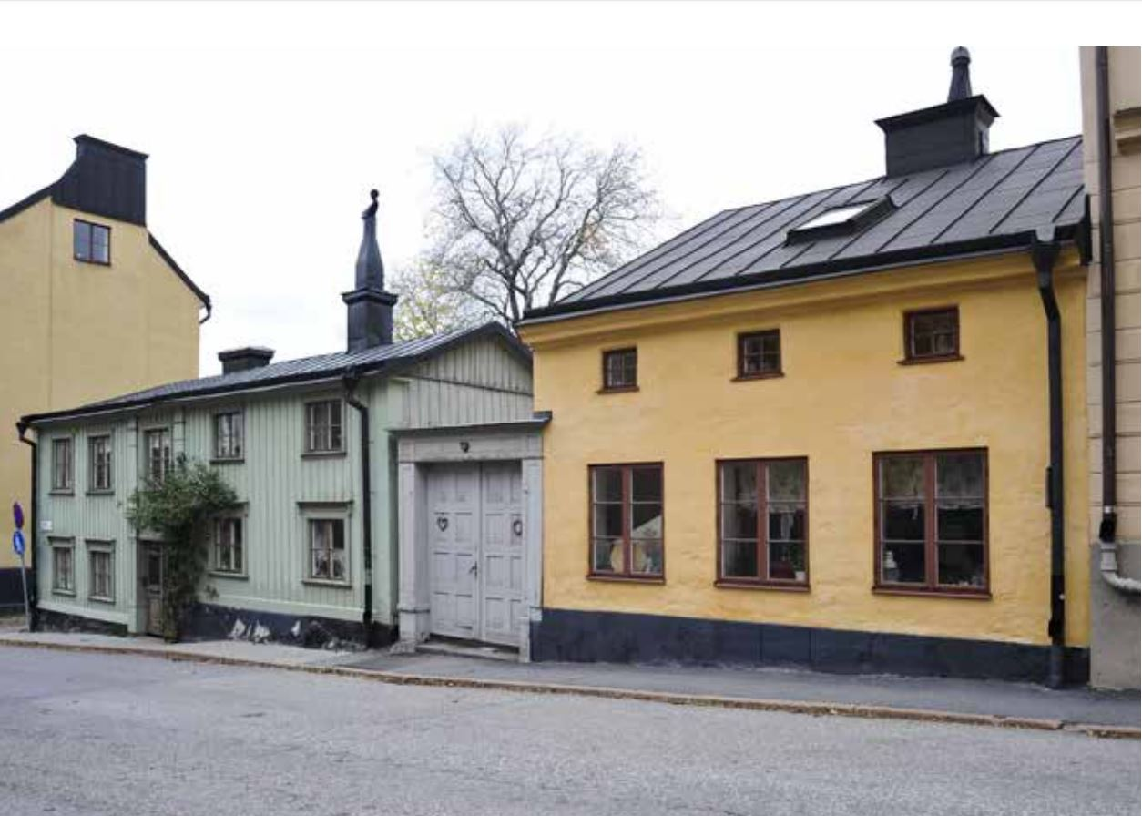 Fastigheten Kattfoten mindre 10 med Bastugatan 44 (närmast) och 46